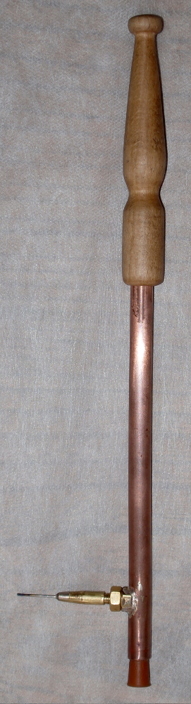 Dmuchavka - jedno z možných provedení.